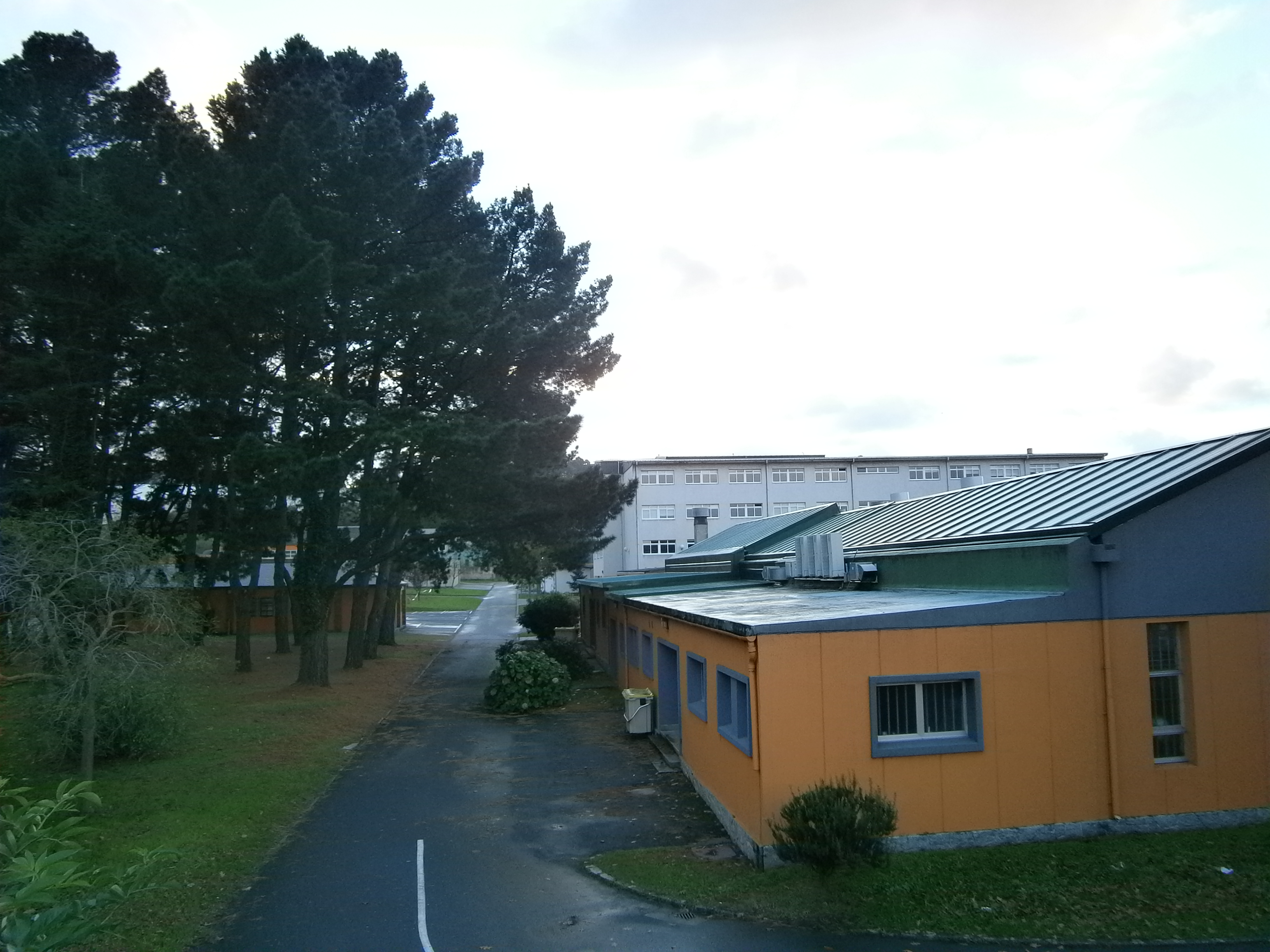 IES Imaxe e Son